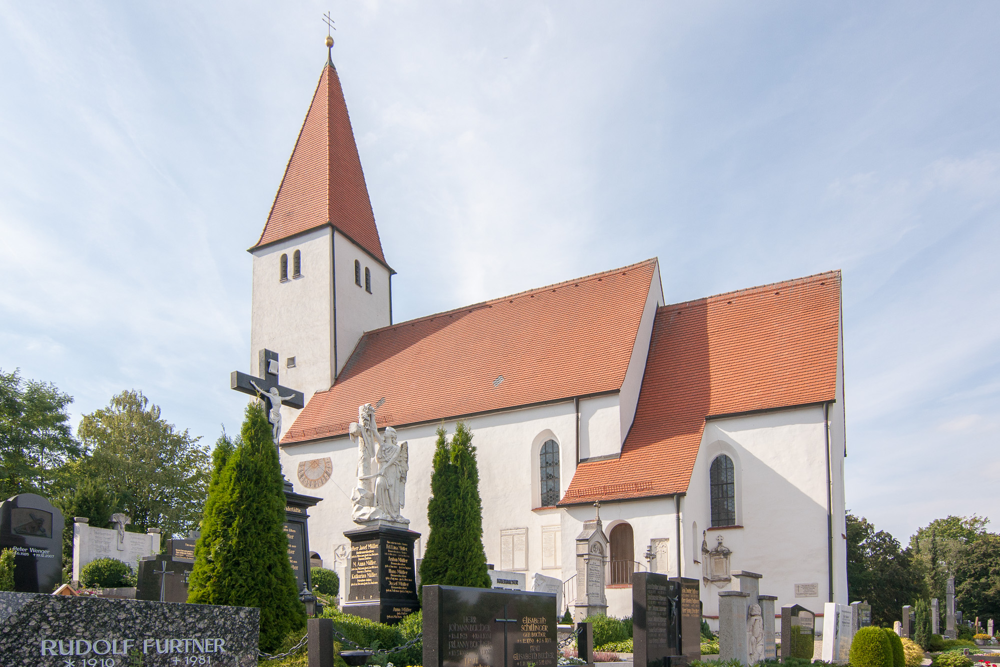 Kath. Friedhofskirche St. Andreas; mit Ausstattung; spätgotisch, 15. Jahrhundert, barockisiert.This is a photograph of an architectural monument.